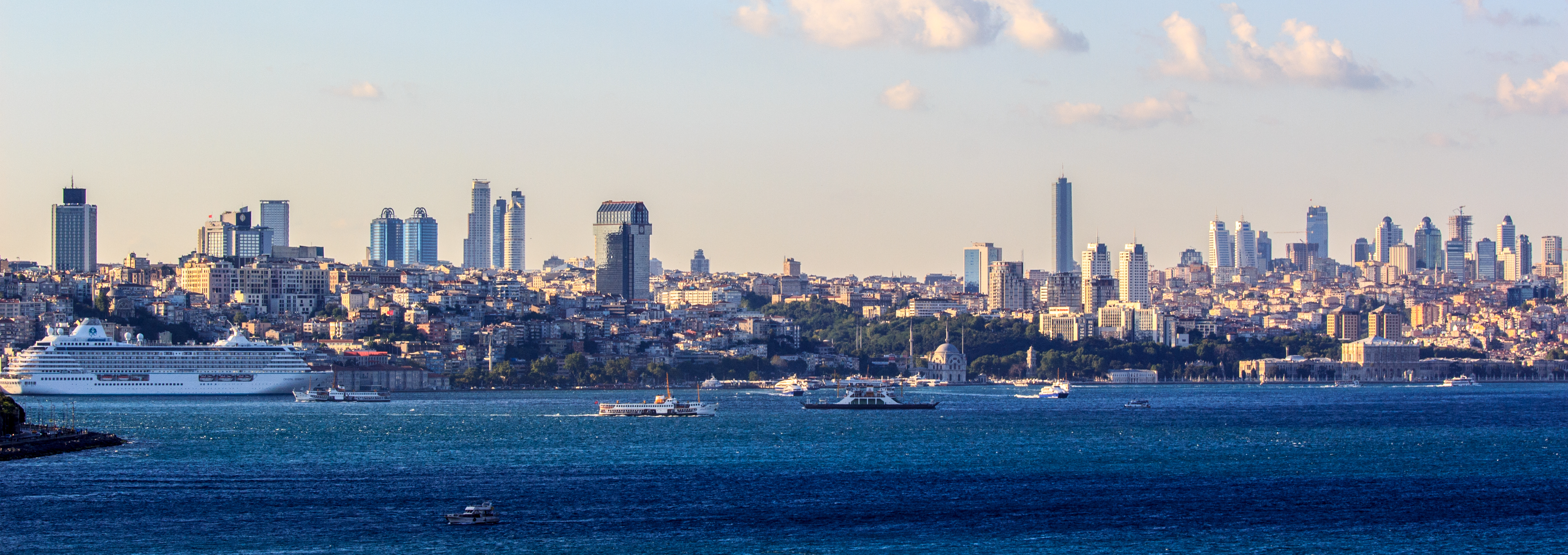 Istanbul Skyline